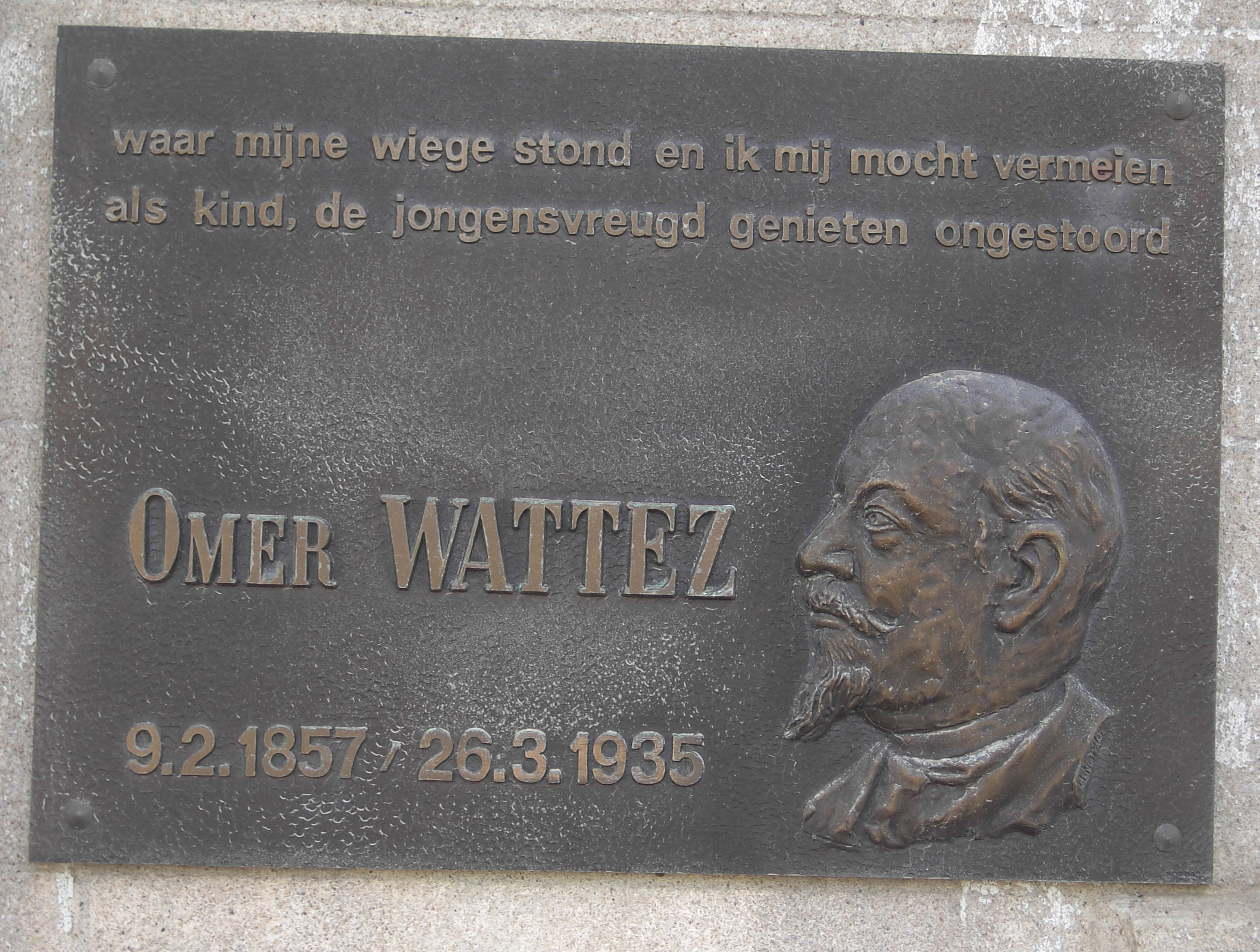 Schorisse - Maarkedal - Vlaams Ardennen - Omer Wattez